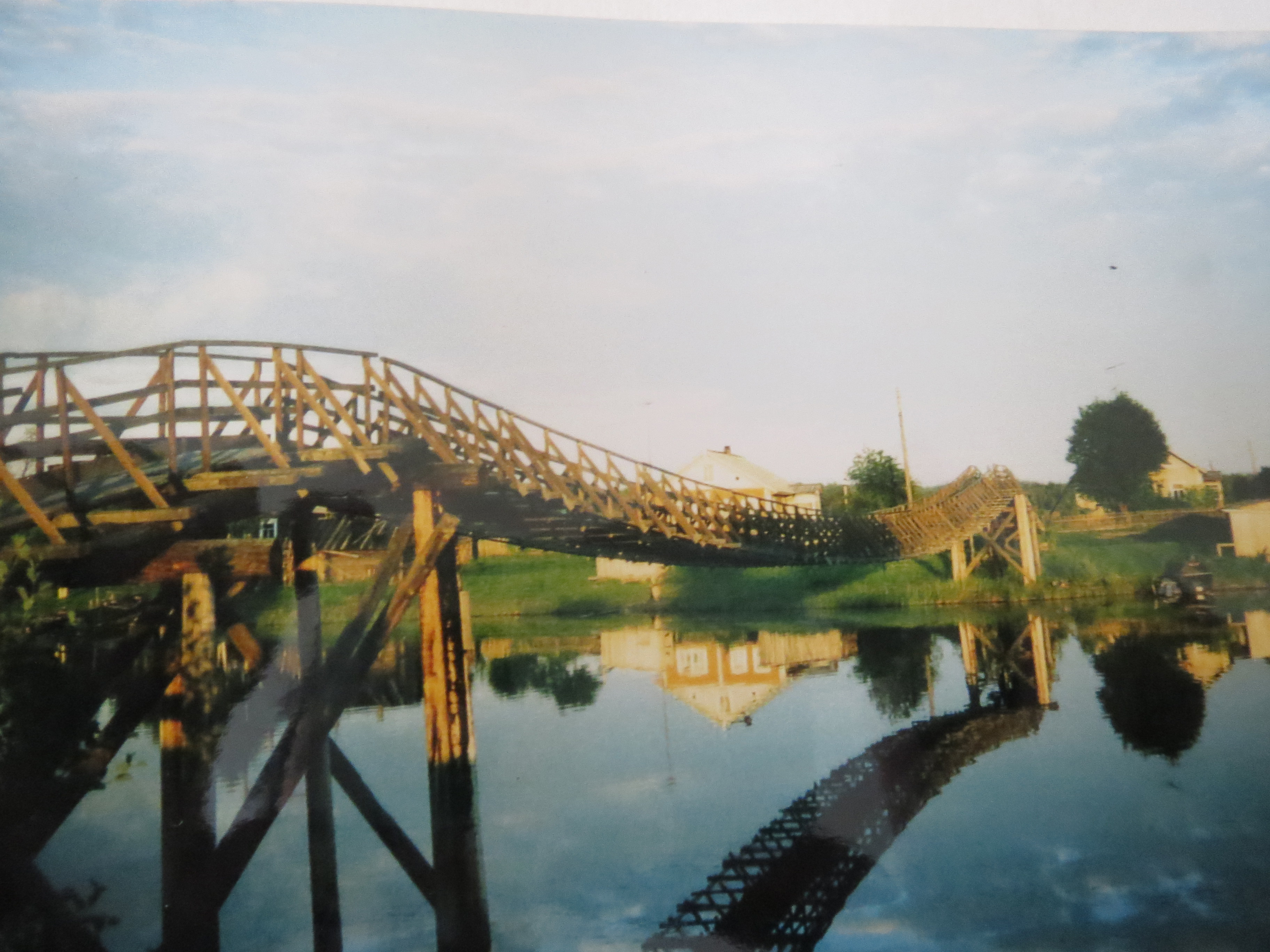 Riippusilta Jyskyjärveltä, Tsirkkakemijoki, alkuperäinen kuva heinäkuu 1996, omasta kotialbumista